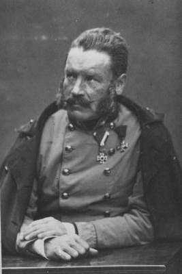 Karl Moering (* 19. Mai 1810; † 26. Dezember 1870), österreichischer Offizier und Abgeordneter des Frankfurter Parlaments 1848.